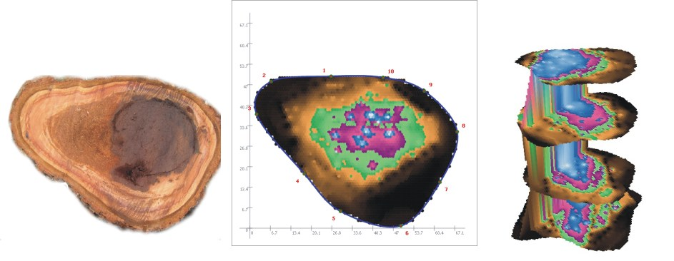 Schalltomogramm eines Eukalyptus-Baums und Foto der Messebene nach der Fällung, 3D-Grafik einer Mehrfachmessung